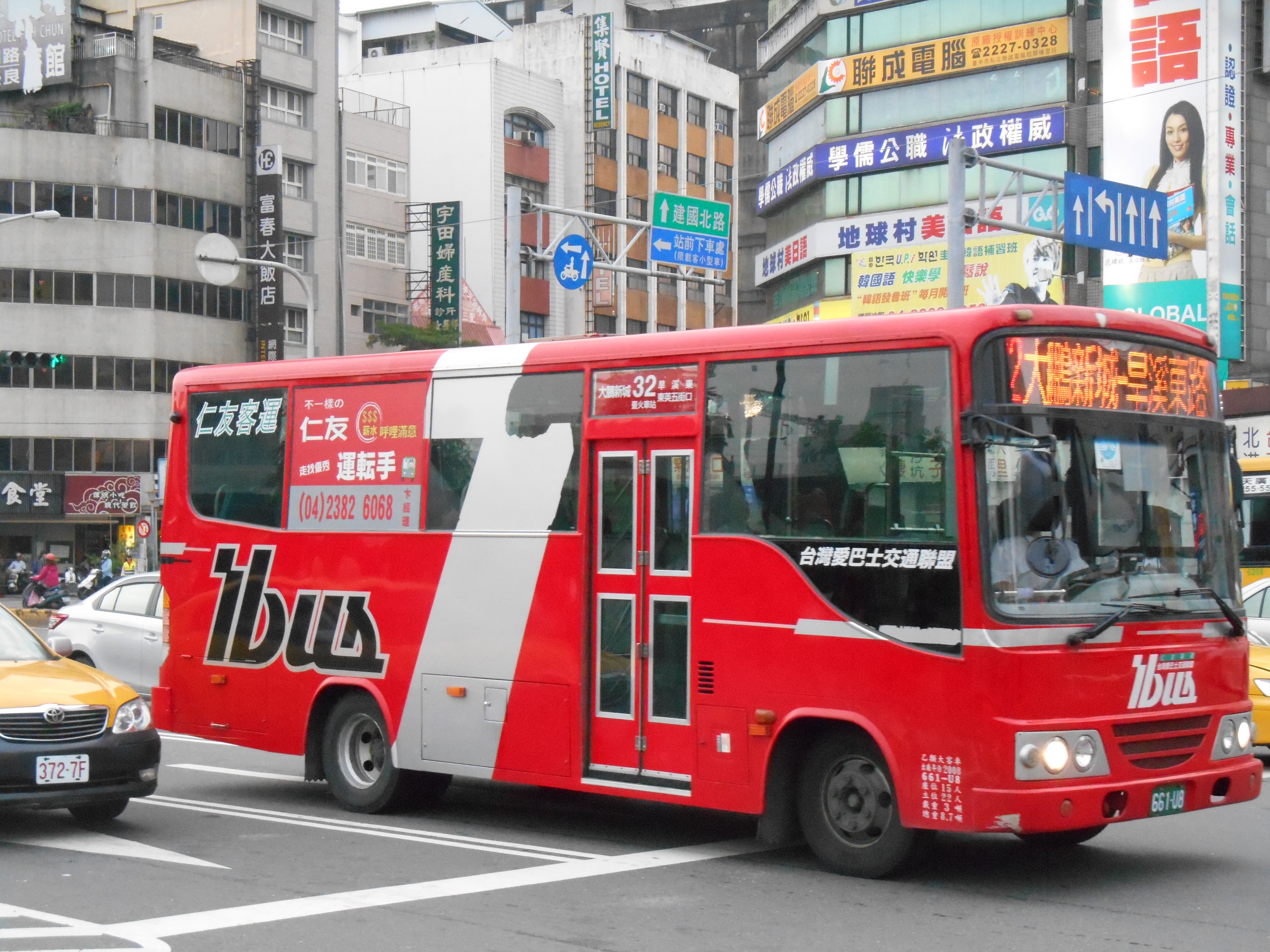 中文（台灣）: 仁友客運五十鈴NQR75PBL中型巴士661-U8擔任臺中市公車32路。